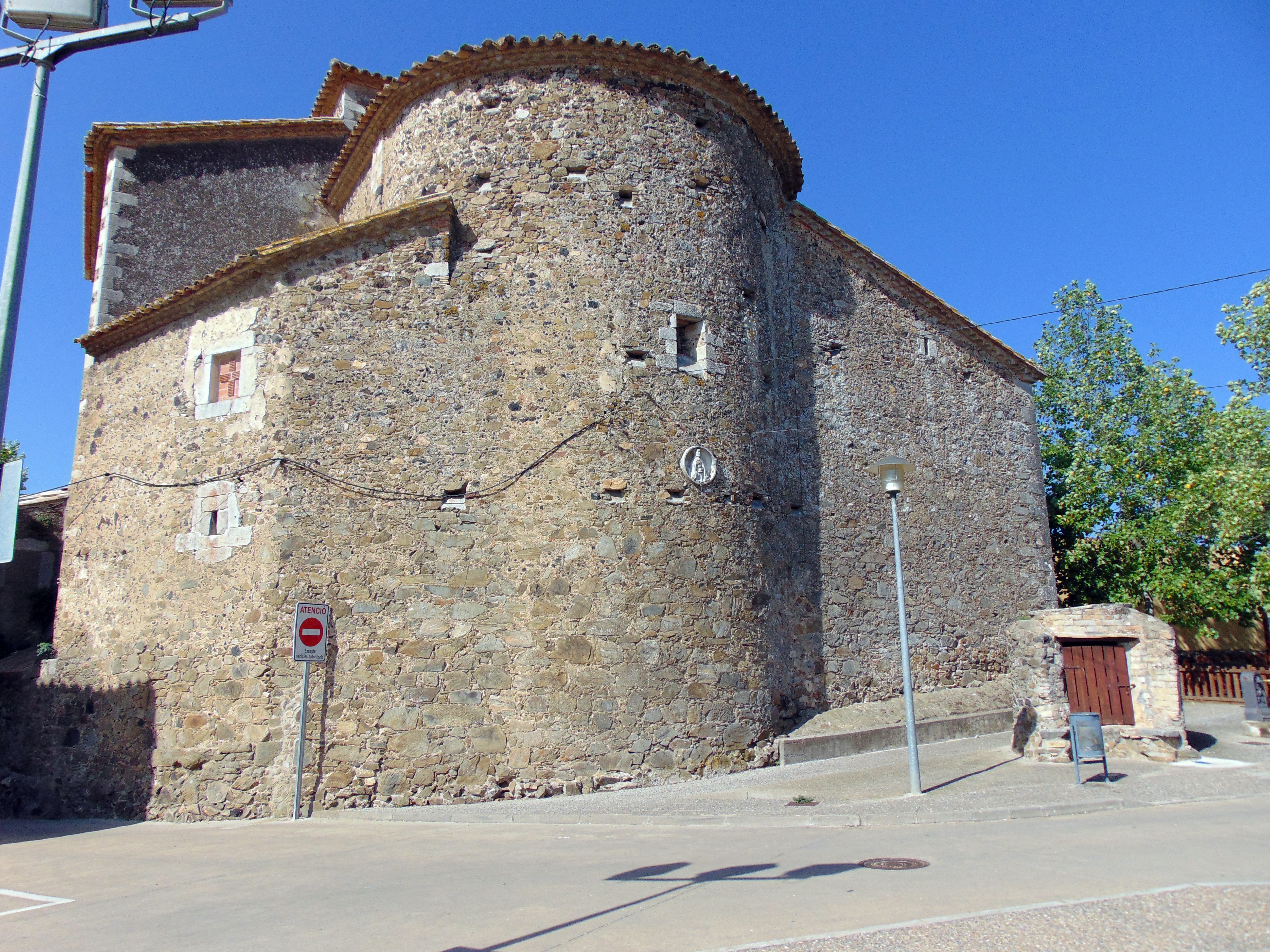 Església parroquial d'Aiguaviva